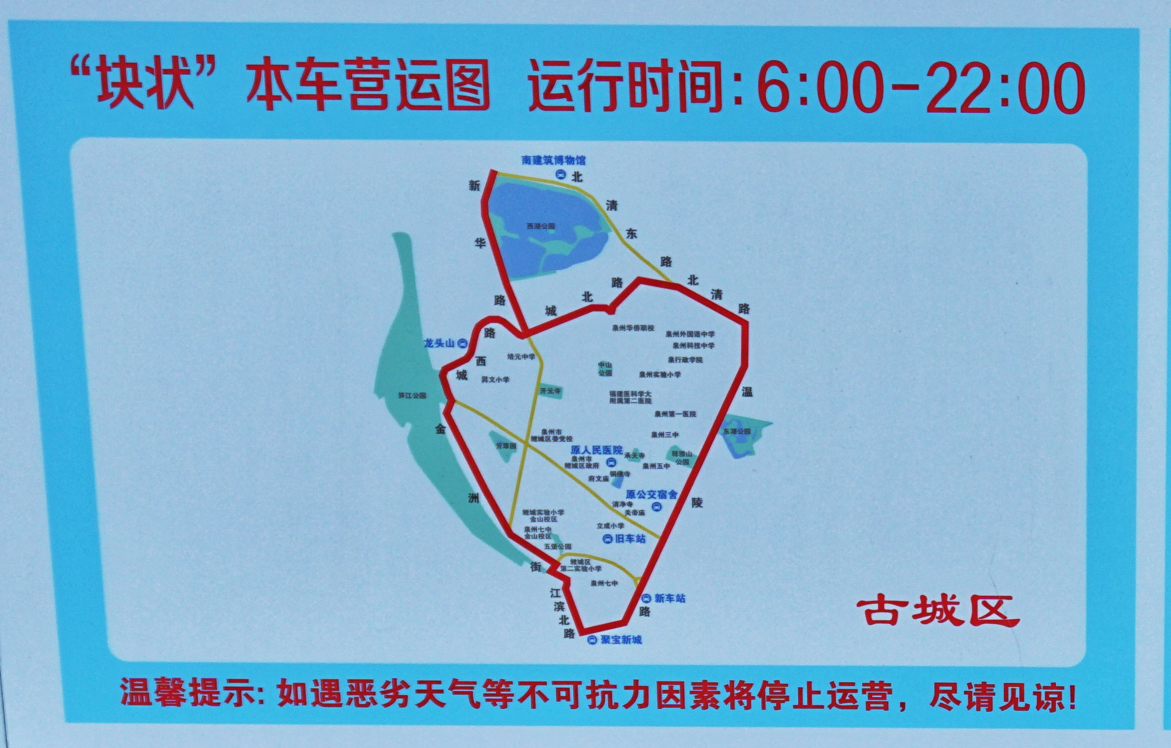 泉州公交块状运行系统运营图